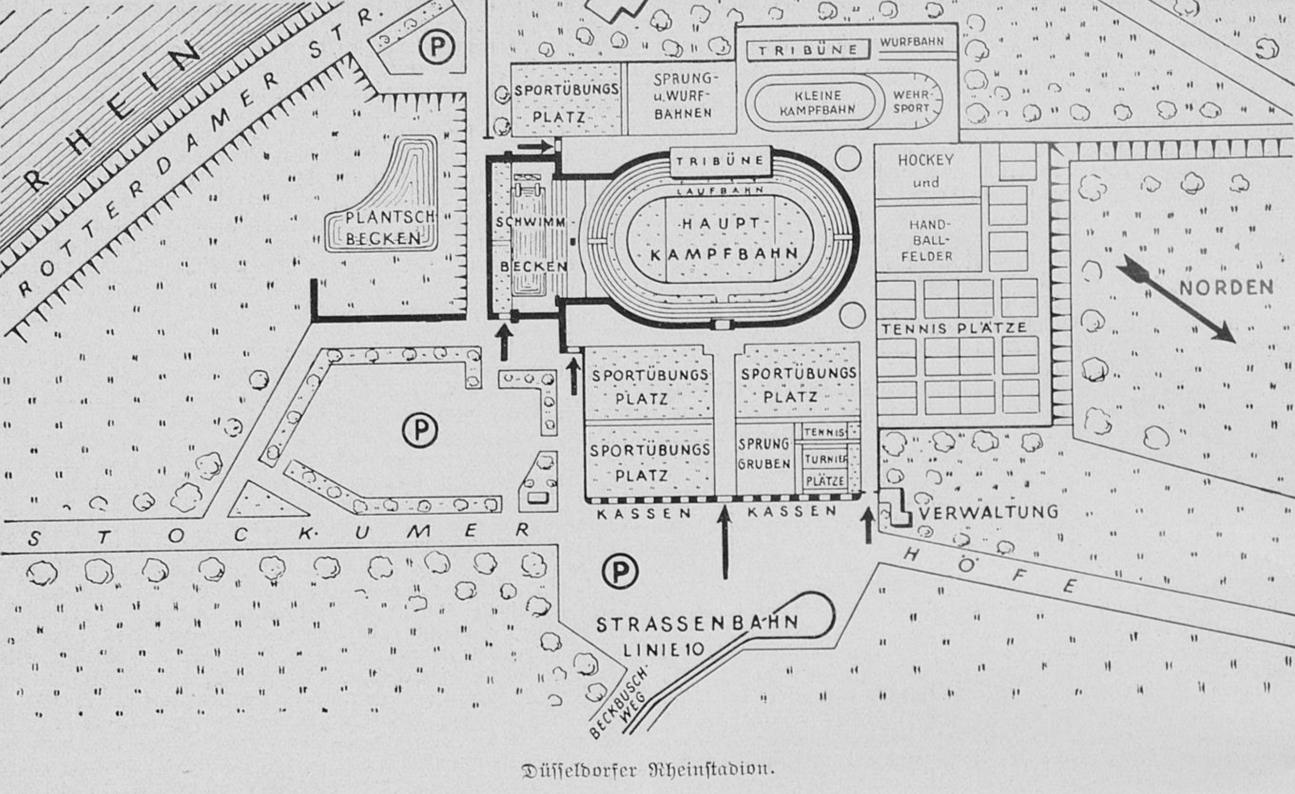 Düsseldorfer Rheinstadion, in Adressbuch der Stadt Düsseldorf, 1937